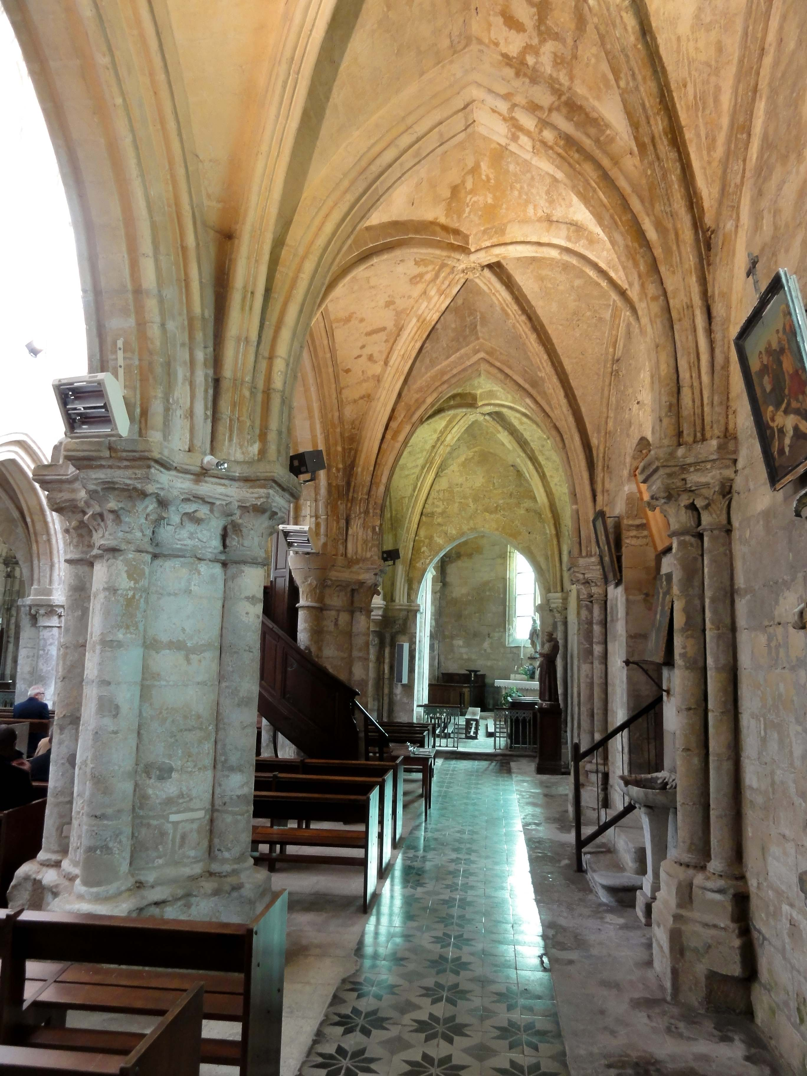 Intérieur de l'église Saint-Martin de Cires-lès-Mello (voir titre).